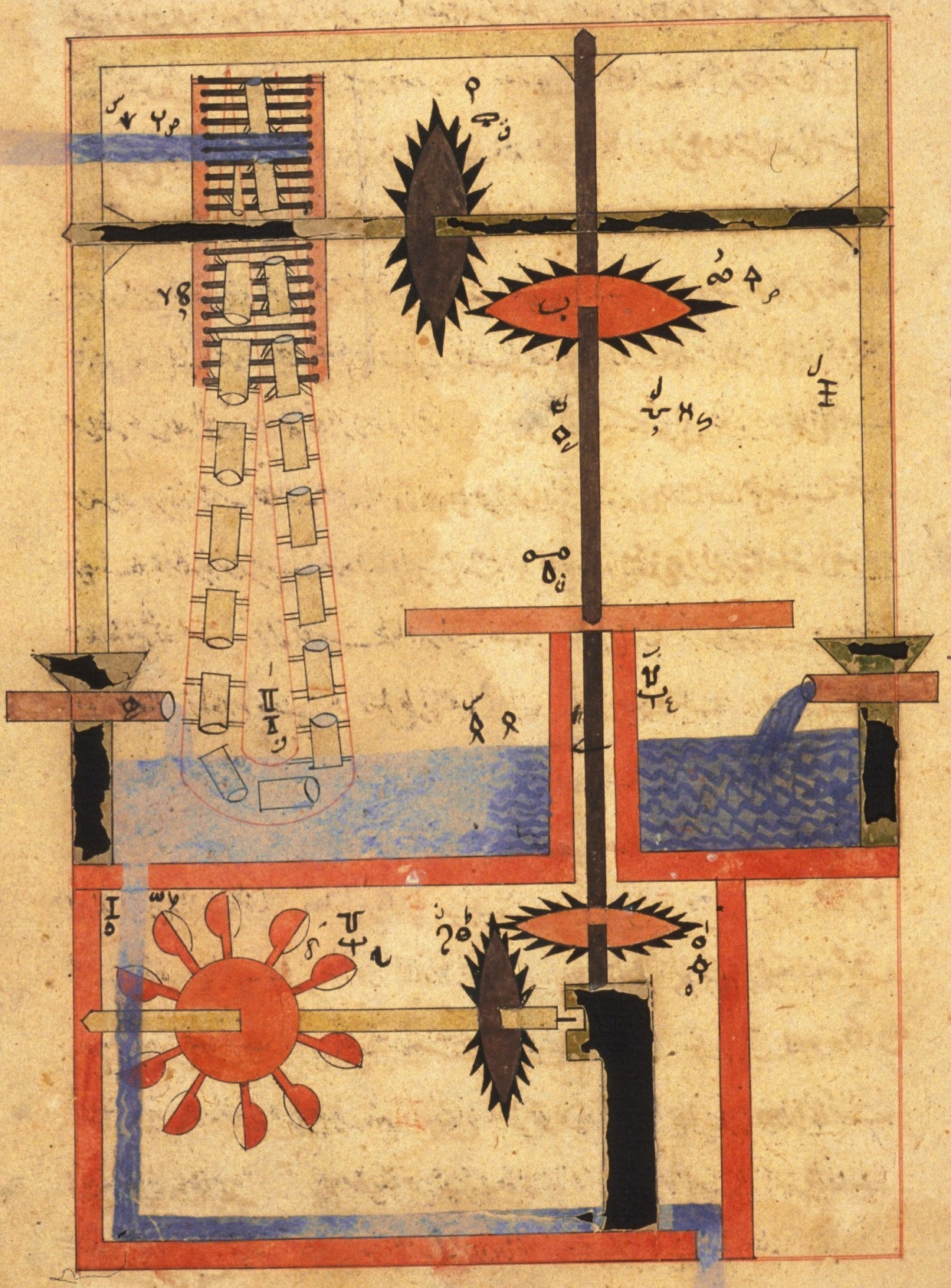 Arabic Machine Manuscript (Orient manuscript 3306)